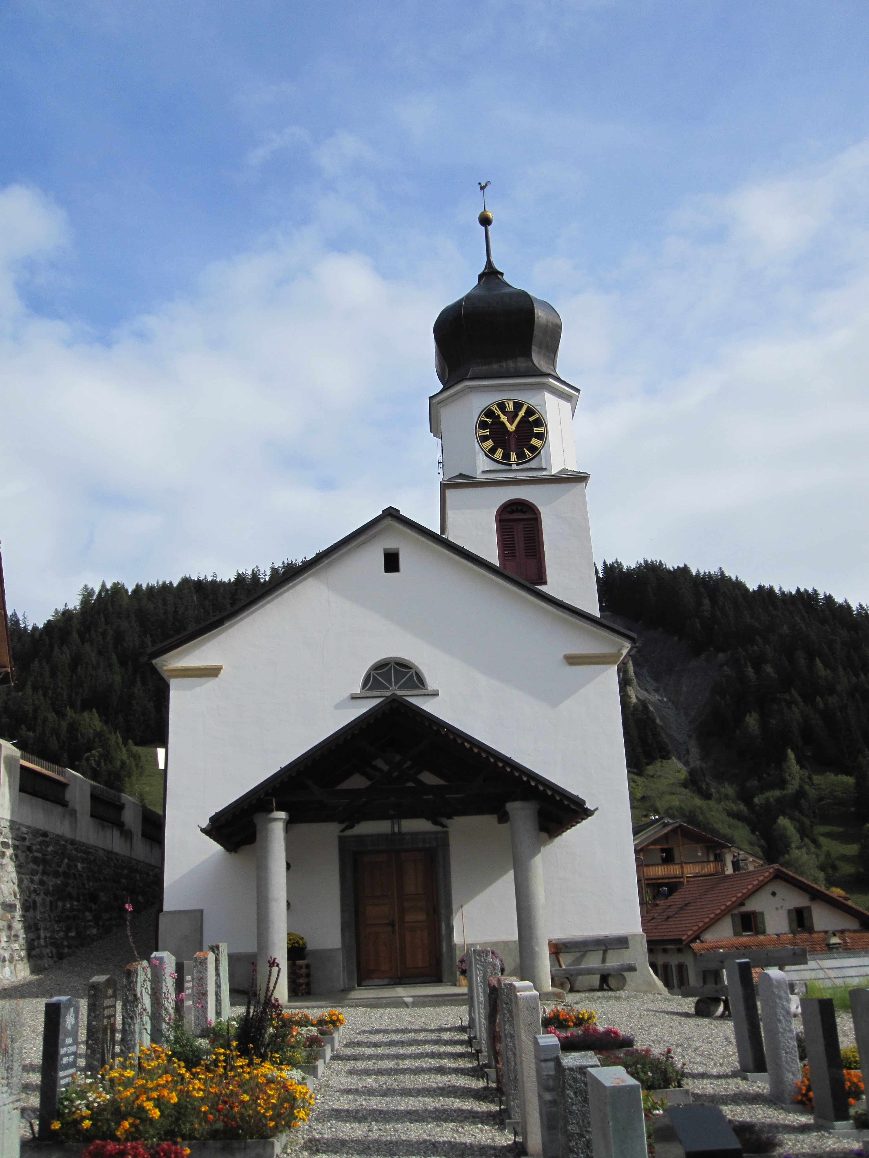 reformierte Kirche Peist (Kanton Graubünden)